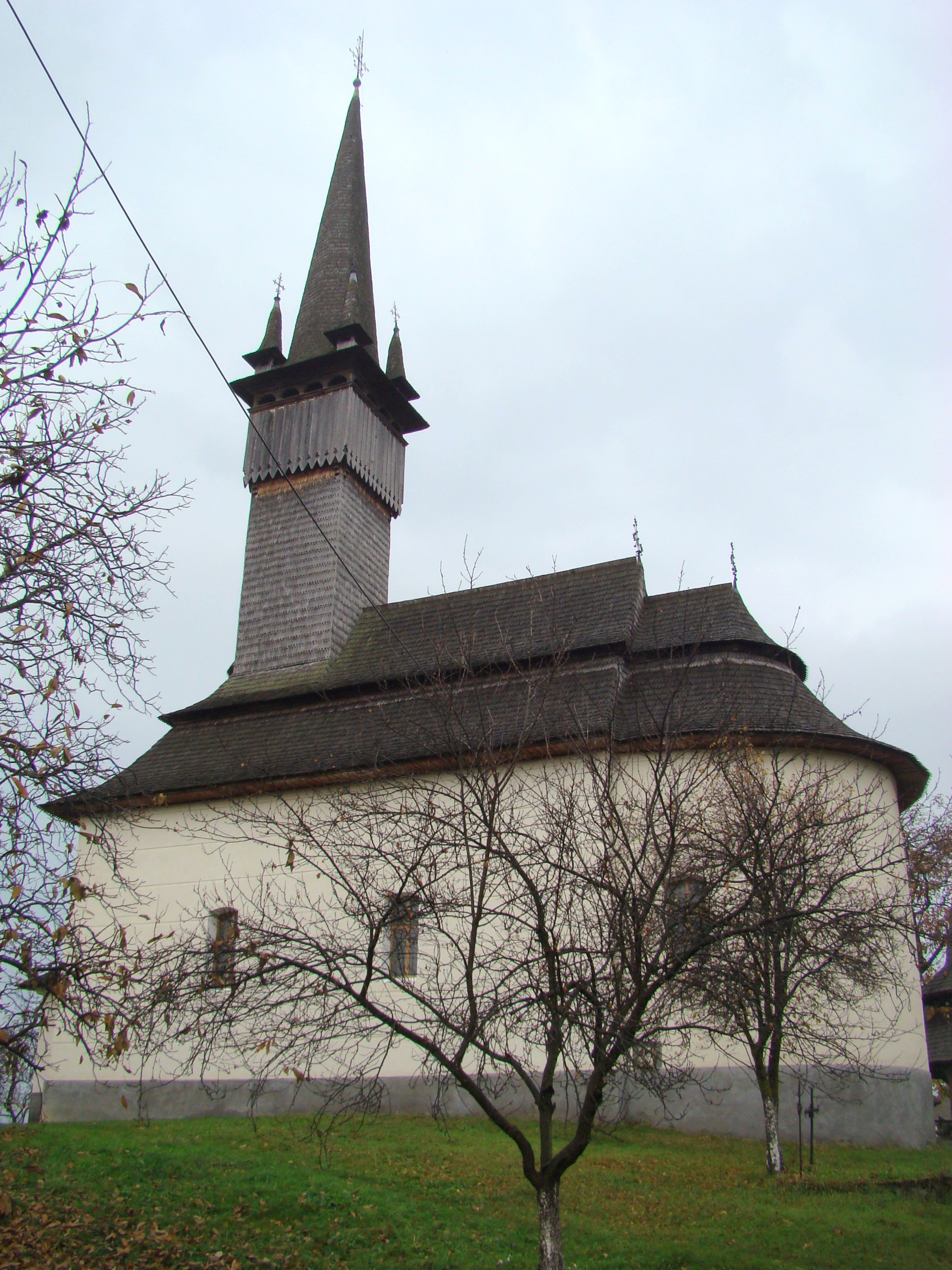 Biserica "Cuvioasa Paraschiva", sat Cetățele; comuna Șișești 01